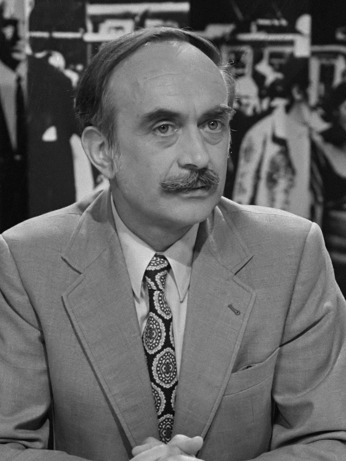 Televisieprogramma Wetsstrijd onder leiding van drs. H. W. M. van Run 6 oktober 1971